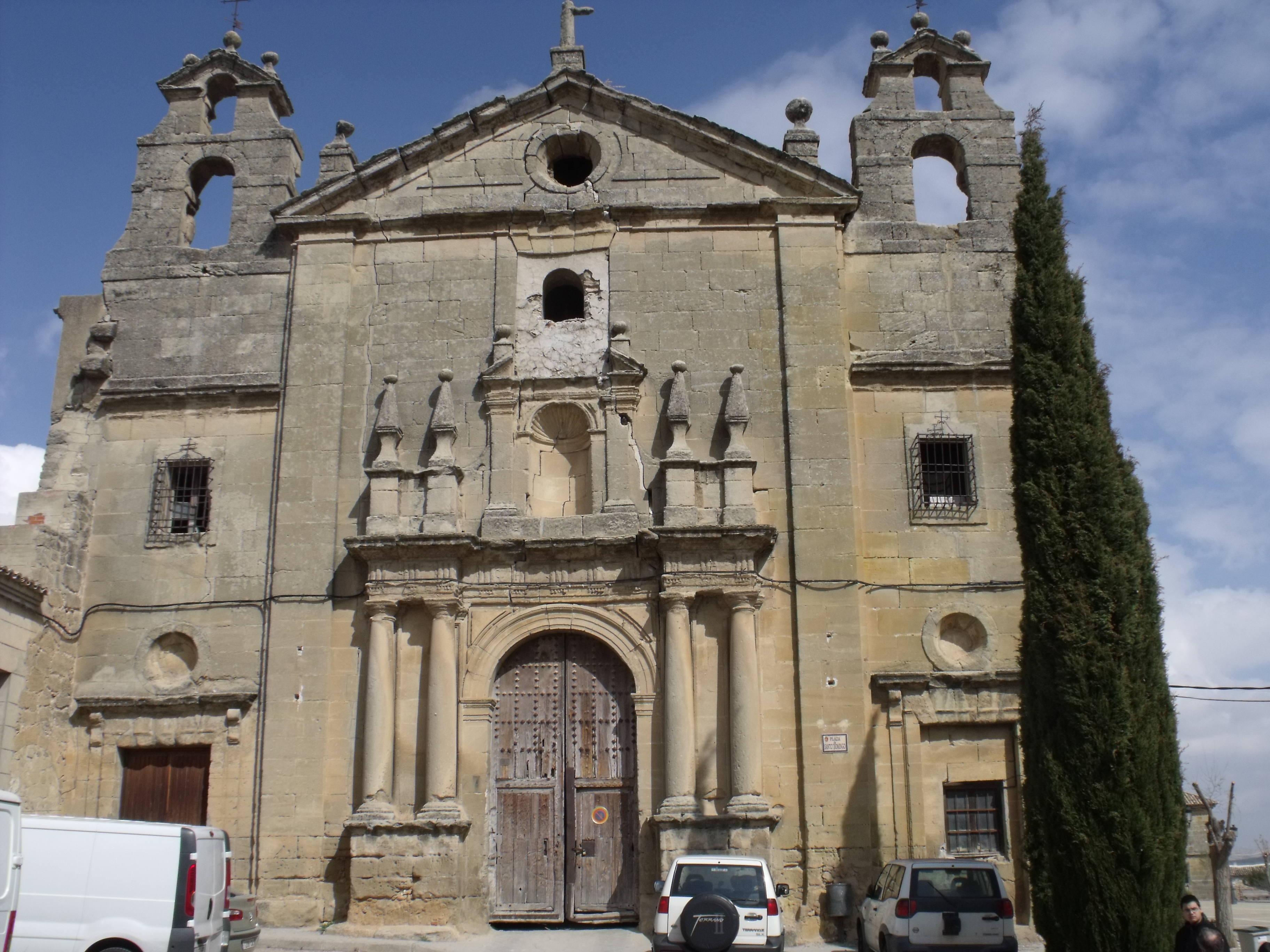 Iglesia de Santo Domingo, en Huete (Cuenca, España)